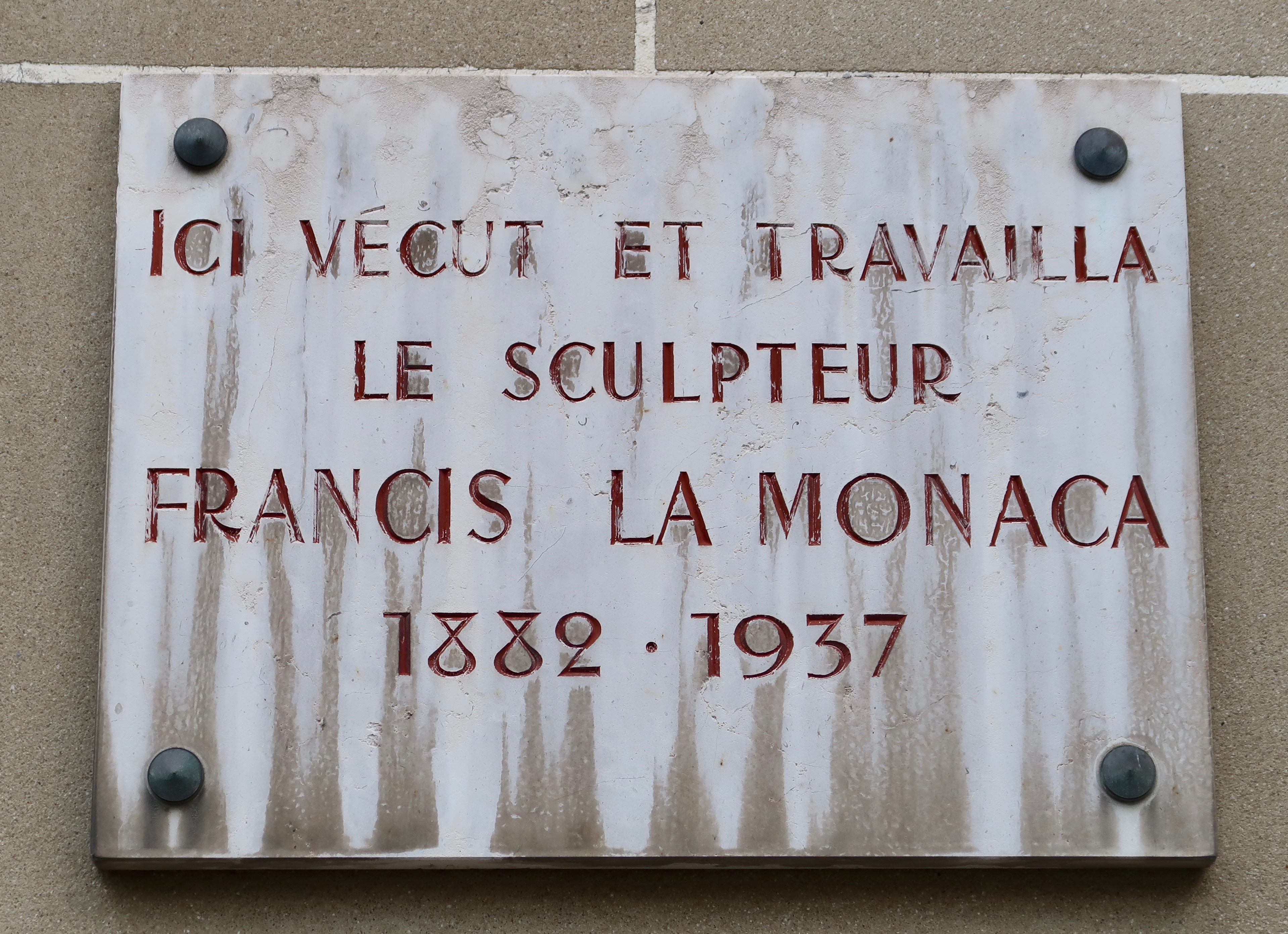 Plaque en hommage à Francis La Monaca, 20 rue Ancelle, à Neuilly-sur-Seine (Hauts-de-Seine).